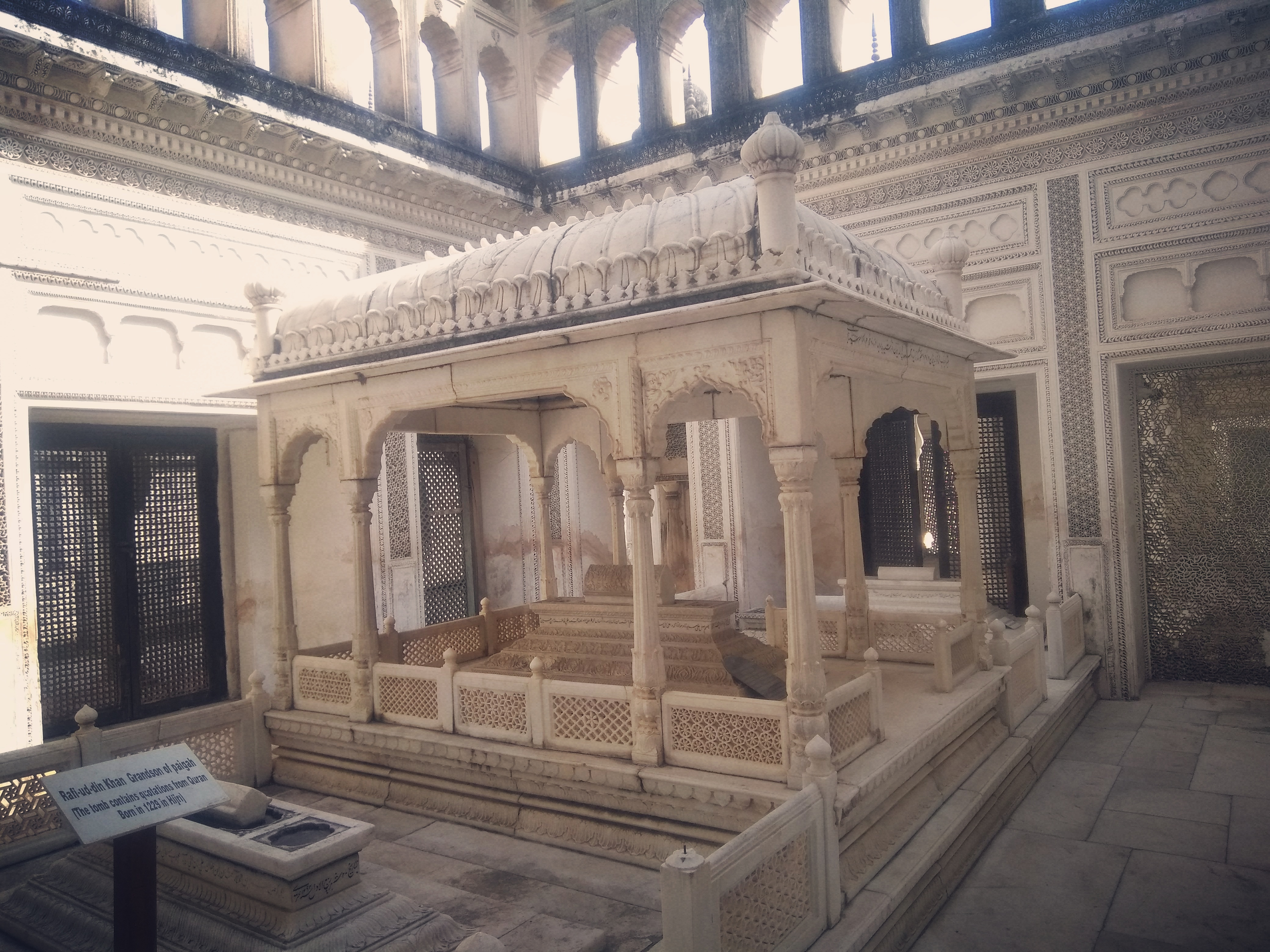 పాయిగా సమాధులు: నిజాం రాజుల తరువాత అంతటి హోదా కలిగిన వారు పాయిగా వంశస్థులు. వీరు హైదరాబాద్ రాష్ట్రంలో ఉన్నతాధికారులుగా ఉండేవారు.బుర్హాన్ పూర్ లో పుట్టి హైదరాబాదుకి వలస వచ్చిన అబూల్ ఫతేఖాన్ తేజ్ జంగ్ బహదూర్ ఈ వంశ మూల పురుషుడు. క్రీ.శ.1756 లో సలాబత్ జంగ్ ,అబుల్ ఫతేఖాన్ ఉన్నతాధికారిగా నియమిస్తూ రక్షణ వ్యవహారాలను అప్పగించాడు.క్రీ.శ.1792 లో తేగ్ బహదూర్ మరణించాడు.ఇక్కడ నవాబు తేగ్ జంగ్ బహదూర్ ఇంకా కుటుంబానికి చెందిన నవాబ్ సర్ అస్మాన్ జా బహదూర్ ( ప్రధాని),నవాబ్ సర్ ఖుర్షాద్ జా,నవాబ్ సర్ వికార్ ఉమగా బహదూర్ ,నవాబ్జంగ్ బహదూర్ (రక్షణ మంత్రి) మెుదలైన వారి సమాధులు ఉన్నాయి. నవాబ్ షమ్స్ ఉల్ ఉమ్రా-3,మరియు ఖుర్షీద్ షా సతీమణుల సమాధులు సున్నం చలువరాతితో అత్యంత సుందరంగా అలంకరించబడ్డాయి . సమాధుల ప్రవేశద్వారం పైన గల రెండతస్తుల భవనం నఖబర్ ఖానా గాను మరియు సహాయకుల నివాసంగా నిర్మించారు. సమాధుల చుట్టూ కిటికీలు ఉన్న ఆర్చీలు ,ఆర్చీలు పిట్ట గోడలు సున్నపు డిజైన్లతో అలంకరించబడ్డాయి .కప్పుల పైన నాలుగు మూలల్లో నాలుగు చక్కటి గుమ్మటాలు,కొమ్ము లాంటి సున్నపు ఆకారాలు చూడముచ్చటగా ఉంటాయి. సమాధుల లోపటి భాగం విలువైన పాలరాతితో పొదగబడి పందొమ్మిదో శతాబ్దపు పిట్రా డ్వూరా శైలిలో అలంకరించబడి ఉంటాయి.గోడలపైన ద్రాక్ష తీగలు,మల్లె తీగలు, పూలు హృదయాన్ని దోచుకునే విధంగా అలంకరించబడి ఉంటాయి. సున్నపు అలంకరణ లో తాళ్ళు,చైనా గుర్తులు మరియు దీర్ఘ చతురస్త్రాకార పట్టీలలో డిజైన్లు వన్నె తెచ్చాయి. సమాధులలోని కొన్ని చోట్లలో రాజస్థానీ -మెుఘలు శైలులను ప్రతిబింబిస్తూ క్రీ.శ.19-20 శతాబ్దాల హైదరాబాద్ కళాకారుల పనితనానికి అద్దం పడుతూన్నాయి. Paigah Tombs Qalender Nagar Rd, Santosh Nagar, Kanchan Bagh, Owaisi Nagar, Hasnabad, Santosh Nagar, Hyderabad, Telangana 500059 1800 4254 6464